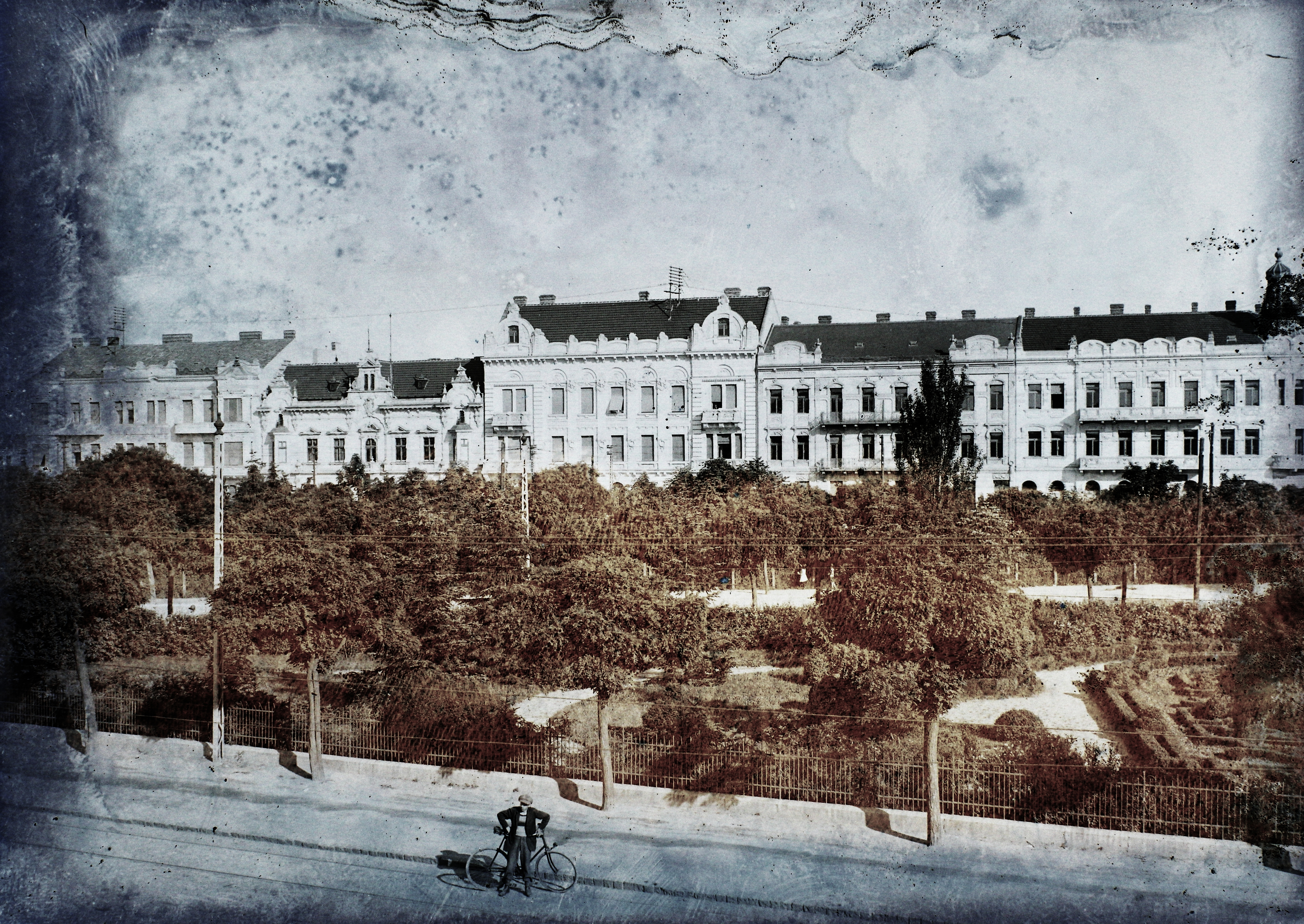 Küttel tér (Piata Alexandru Mocioni). Location: Romania, Transylvania, Timisoara Title: Küttel tér (Piata Alexandru Mocioni).